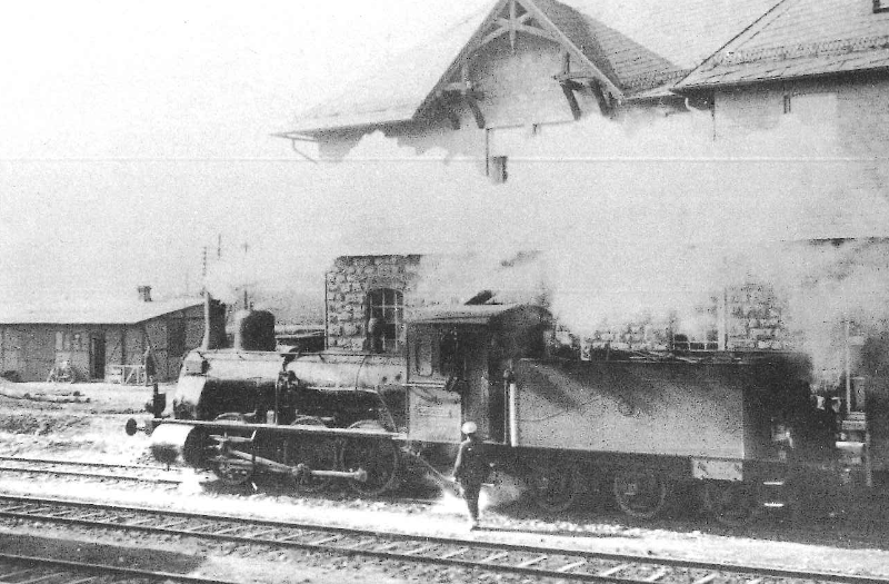 Preußische G 4.2 als Marburger Kreisbahn 3 (Drittbesetzung)